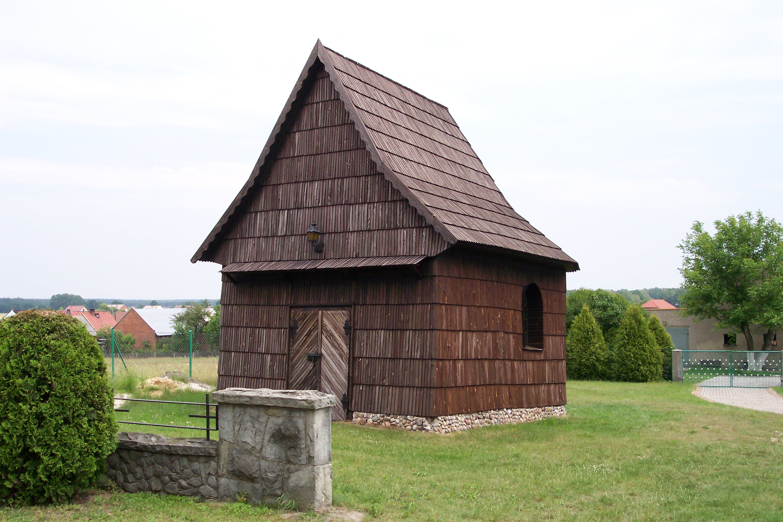 Kościół pw. Świętej Trójcy w Szemrowicach